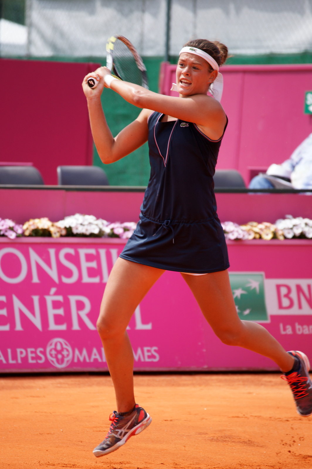 Chloé Paquet, Open ITF Cagnes-sur-Mer 2013